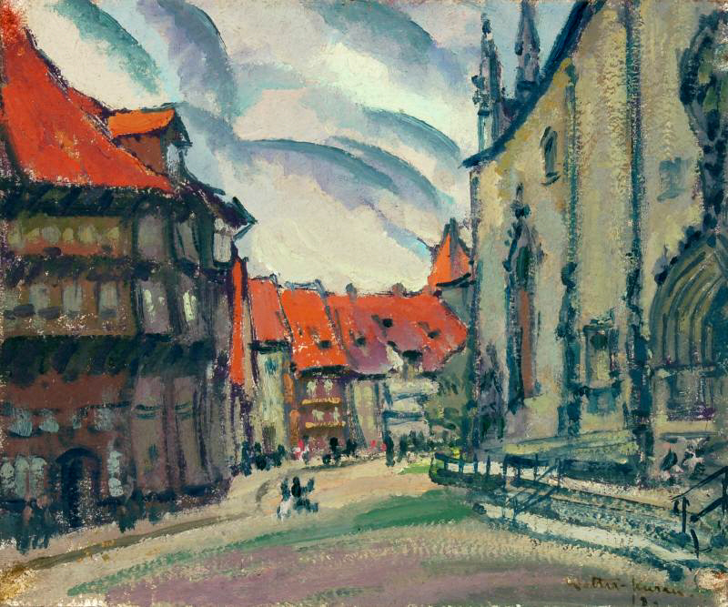 Kirchplatz. 1918. Öl auf Malpappe. 21,5 x 25,5 cm